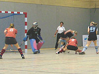 Spielszene weibliche Jugend A DM 2009 in Dortmund vom Spiel Berliner HC - Klipper Hamburg